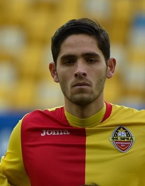 Джонатан Мойя - костариканский футболист